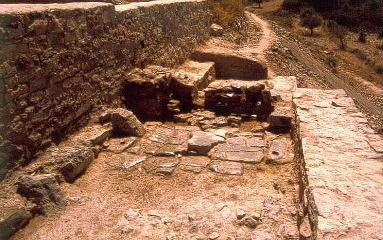 Puerta de entrada del Castellet de Bernabé